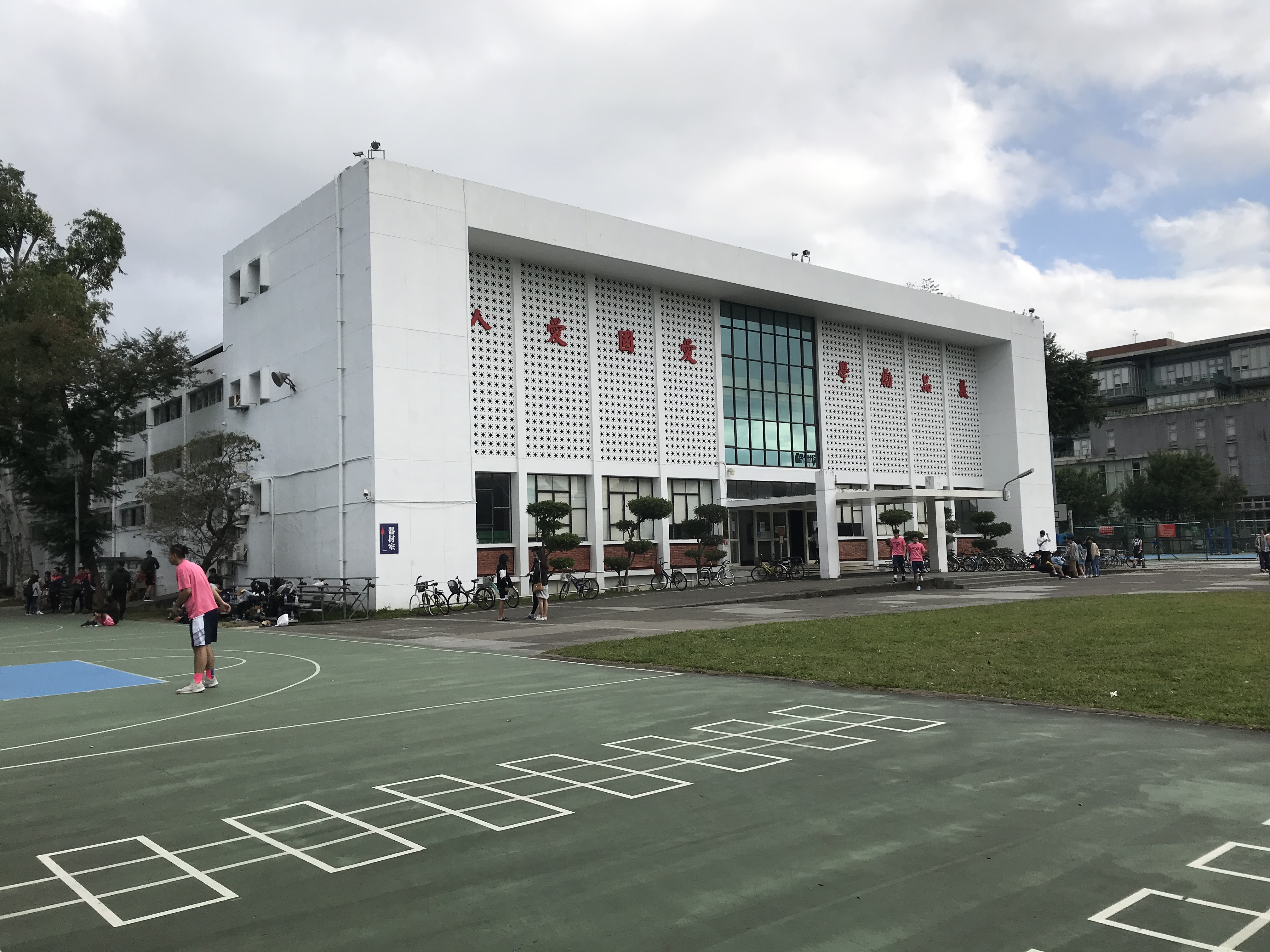 中文（台灣）: 國立臺灣大學體育館。